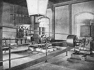 Kraftverket i Stocksund (Djursholmsbanans elverk), maskinhall